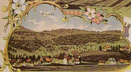 Risana (barvna) razglednica iz leta 1899, ki jo je po naročilu trgovca in gostilničarja Petra Trohe iz Babnega Polja, ki je razglednico tudi založil, narisal češki slikar. Razglednica prikazuje zaselek Bukovica in Hrib.